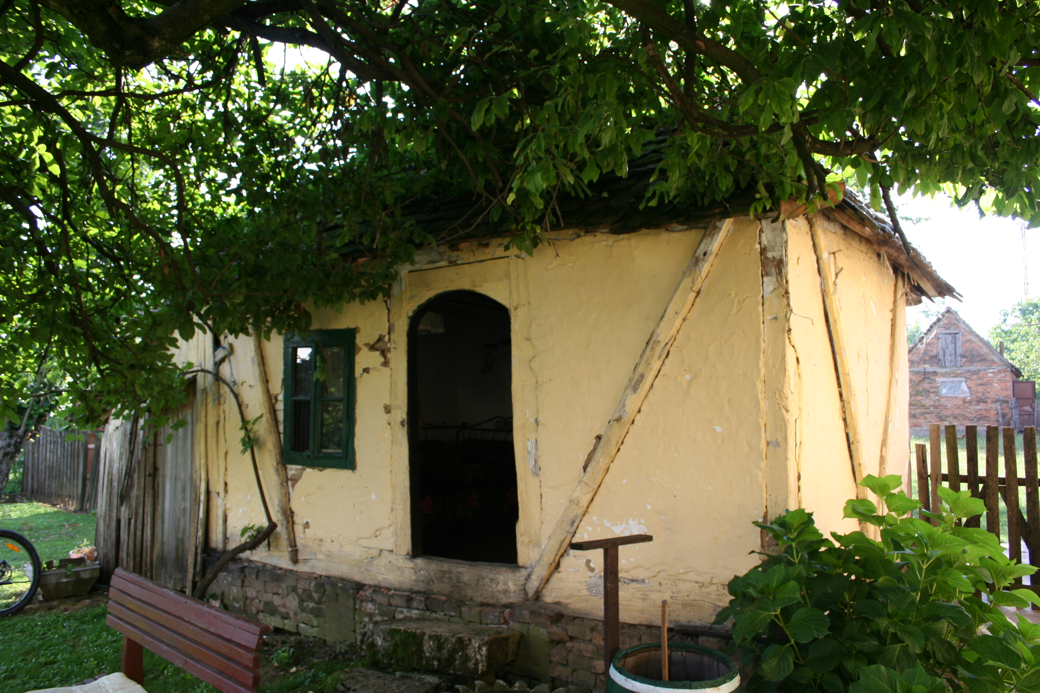 Vajat Hajduk Veljka, Crna Bara